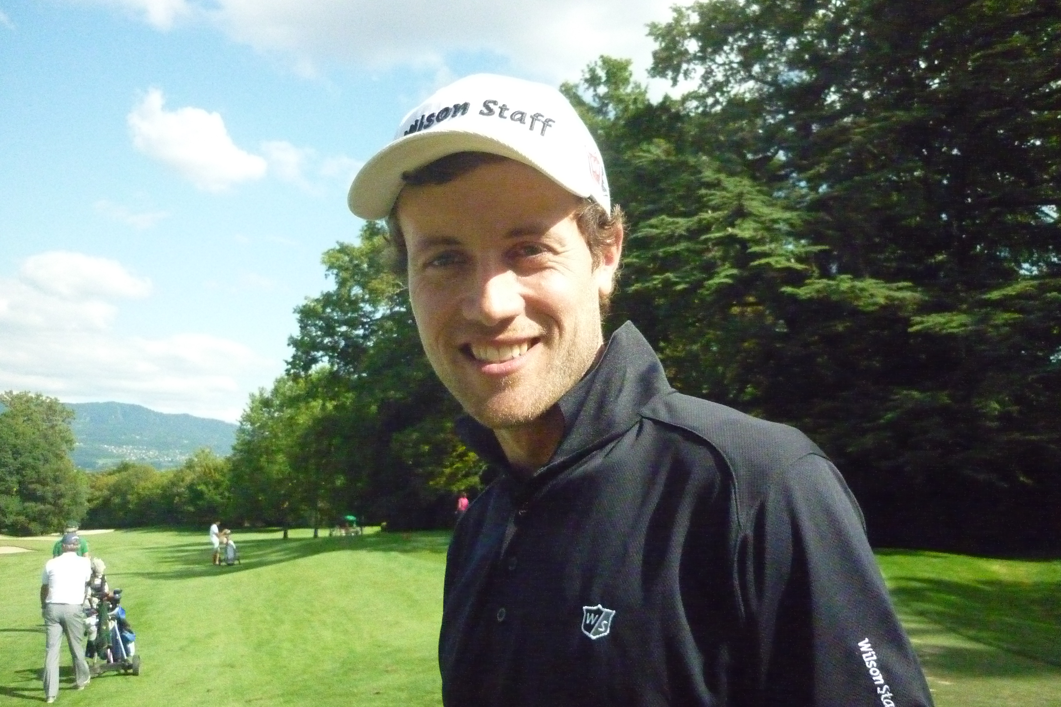 William Harrold